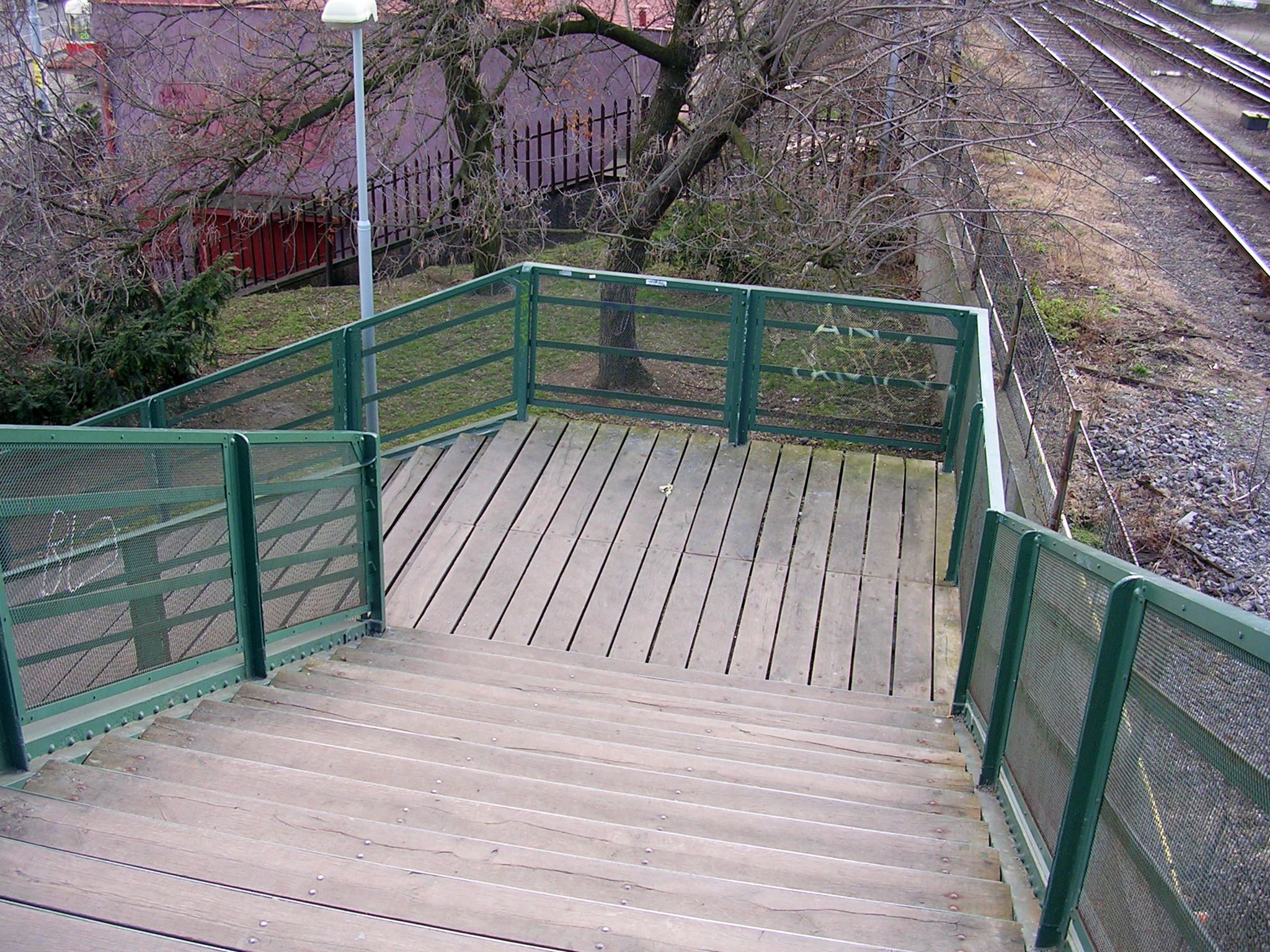 Praha, Smíchov, lávka přes Smíchovské nádraží, východní schodiště, dubové schody